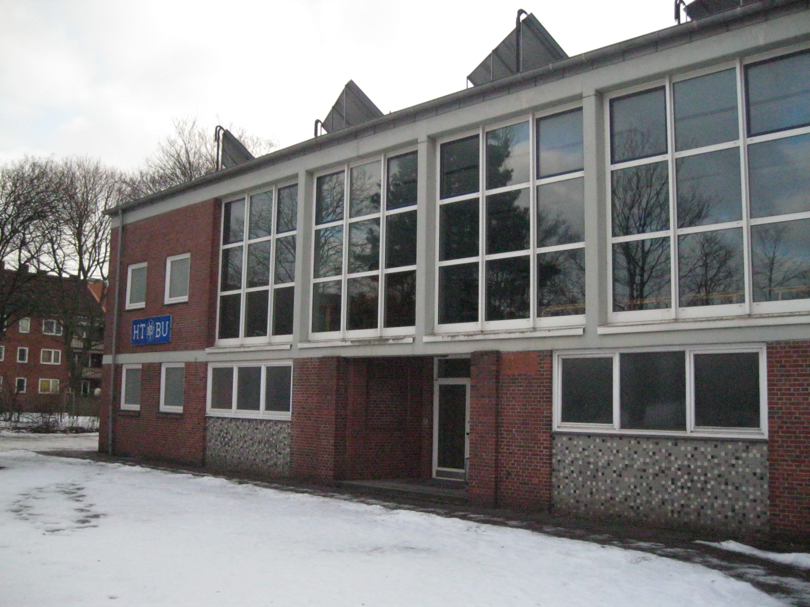 Anbau an der Turnhalle der HTBU (nach 1945 entstanden)